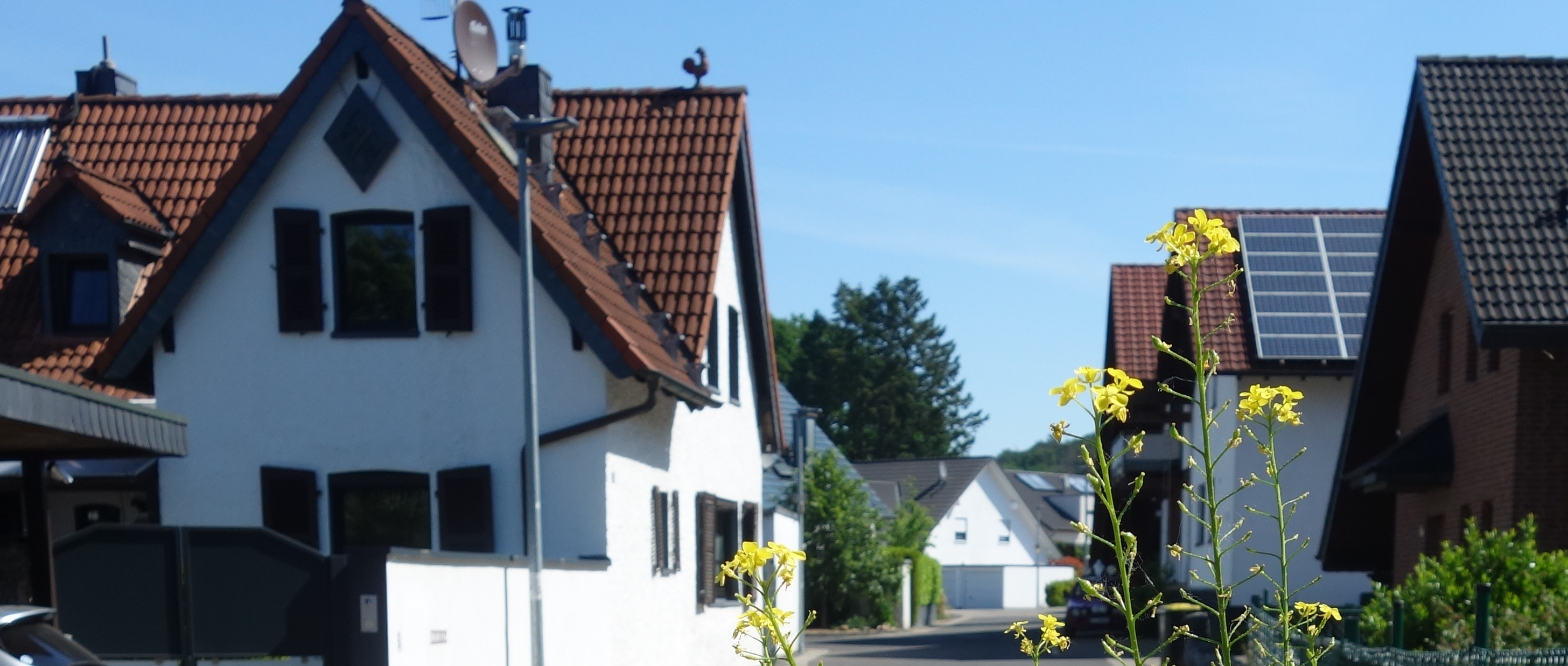 Häuser in Eichen, Katterbach (Bergisch Gladbach)